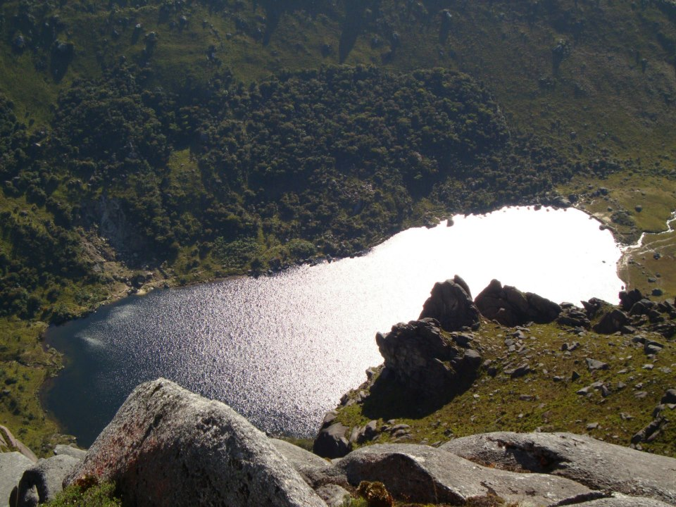 Laguna negra, parque del sistema Lacustre del Ecuador